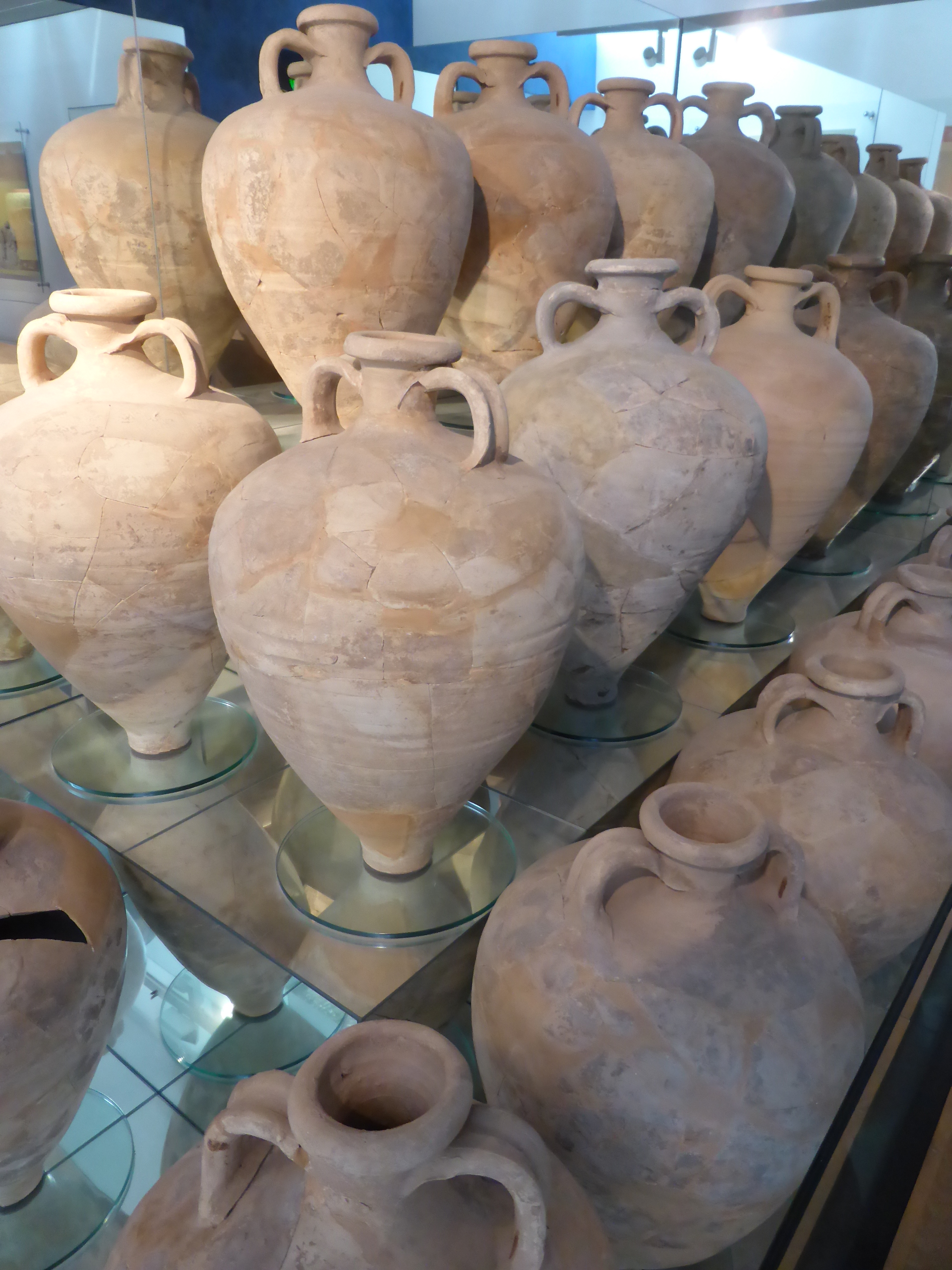 Amphores gauloises 4 au musée des potiers Amphoralis de Sallèles d'Aude